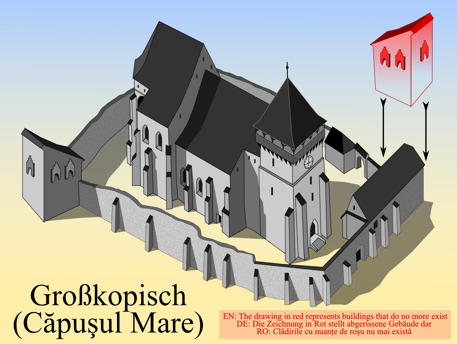 Biserica fortificata din Copsa Mare